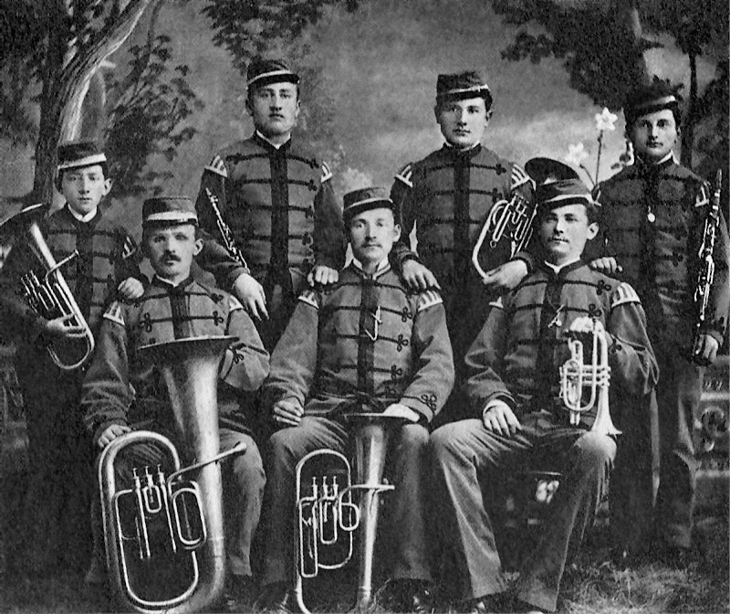 Kapelle Carl Weber bei einer Nordamerikareise 1882-1883